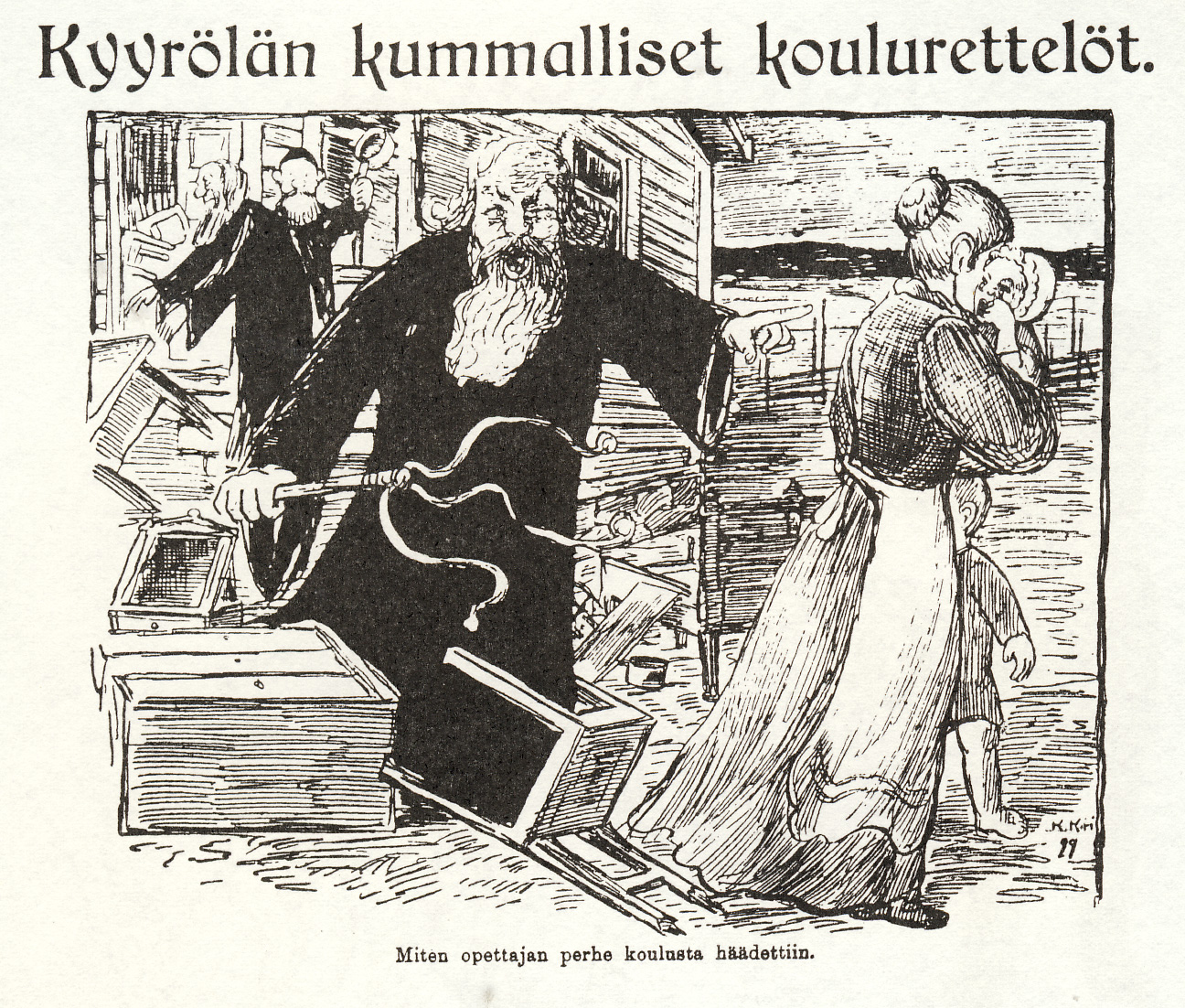 Kaarlo Karin pilapiirros Kyyrölän koulurettelöstä, ilm. Matti Meikäläinen 1.9.1899; piirros johti lehden lakkauttamiseen.